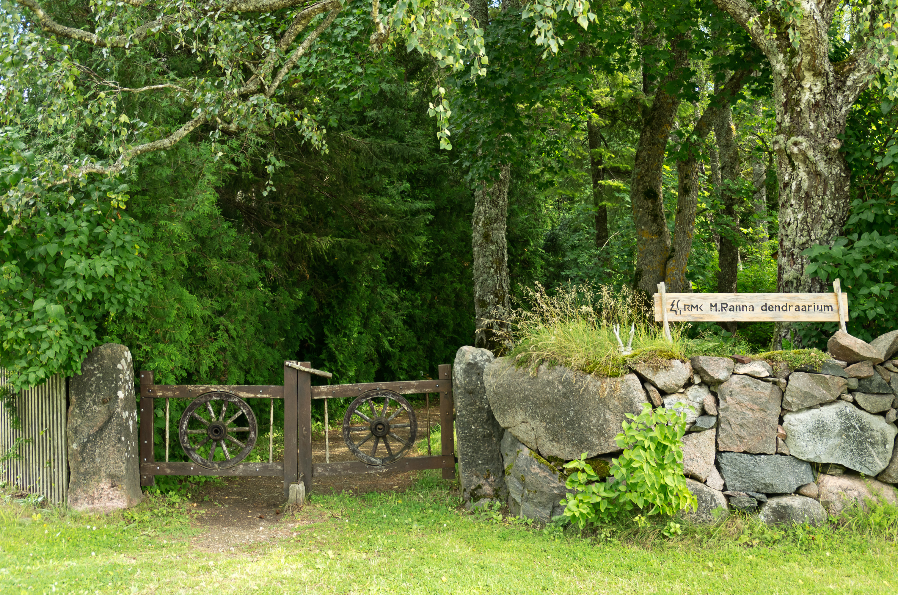 Mihkel Ranna dendraarium Saaremaal. Värav